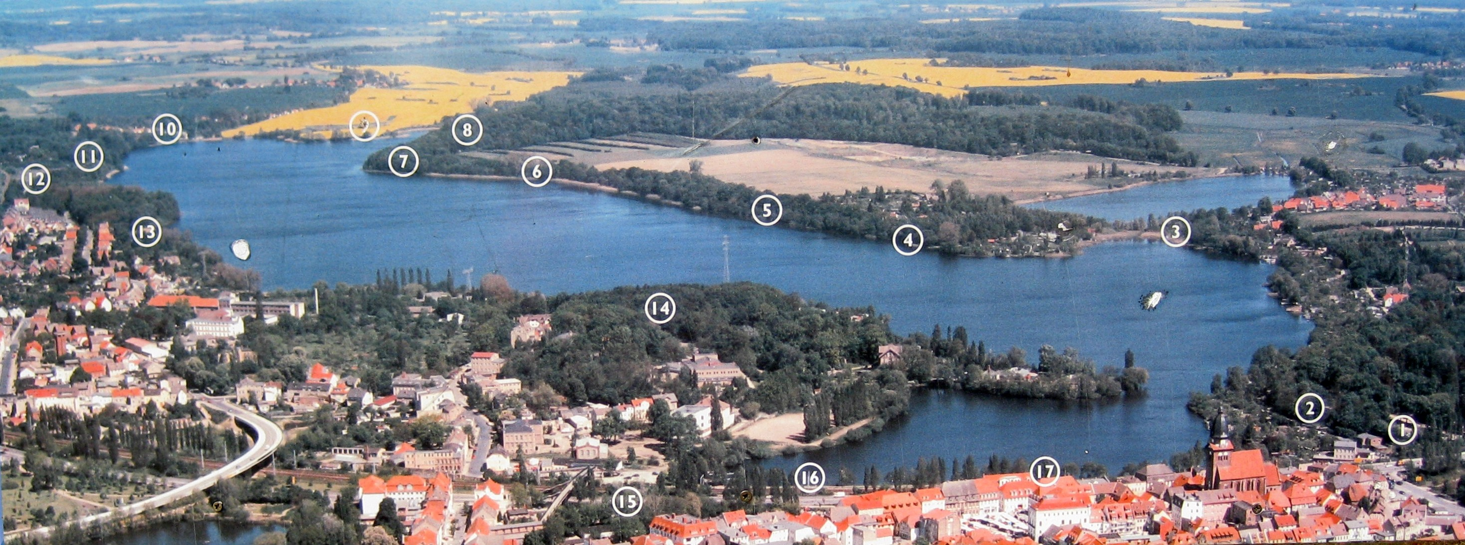 Überblick über den Eiszeitlehrpfad um den Tiefwarensee - aufgestellt am Ausgangspunkt des Weges "Parkplatz Friedhof"